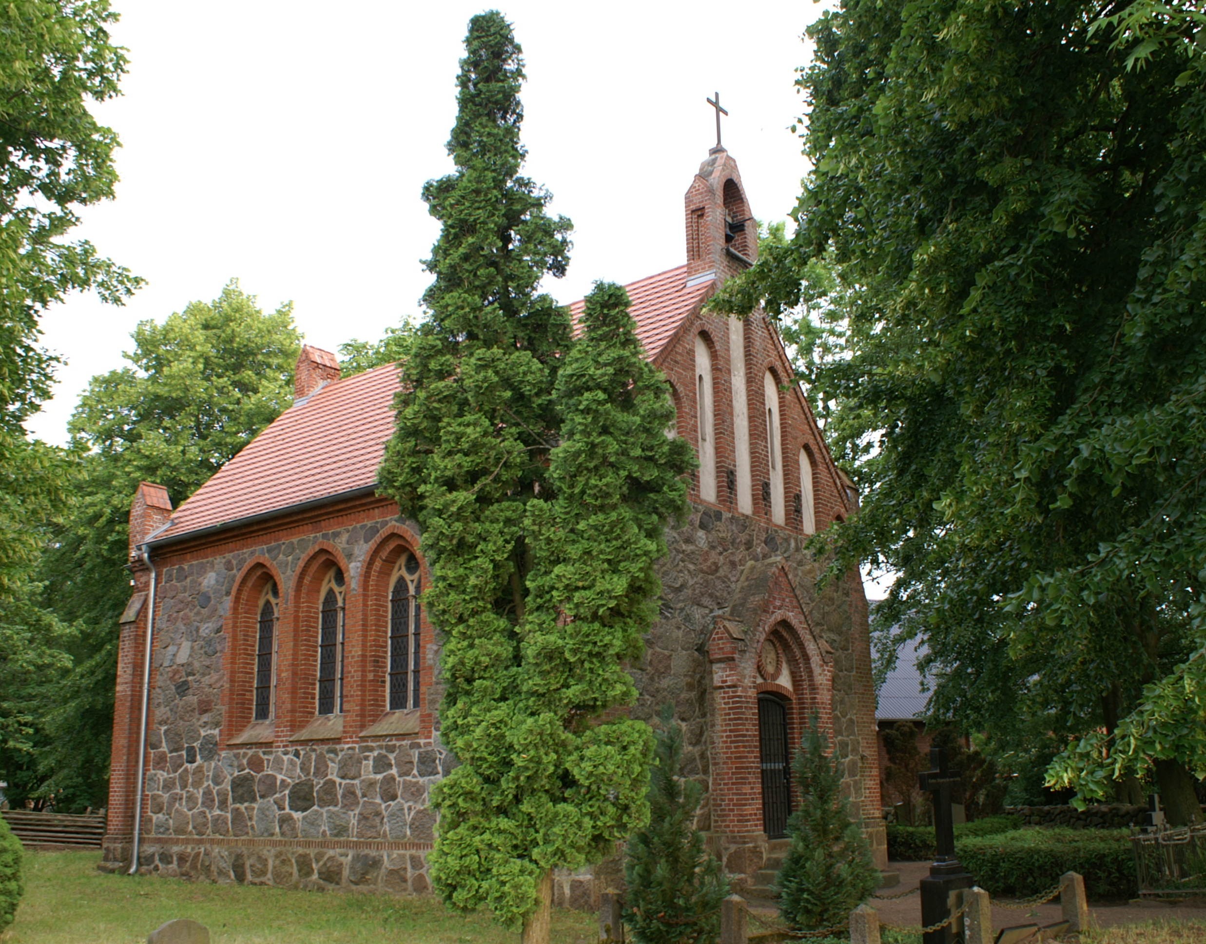 Kirche in Grüttow, Ansicht von Nordwesten